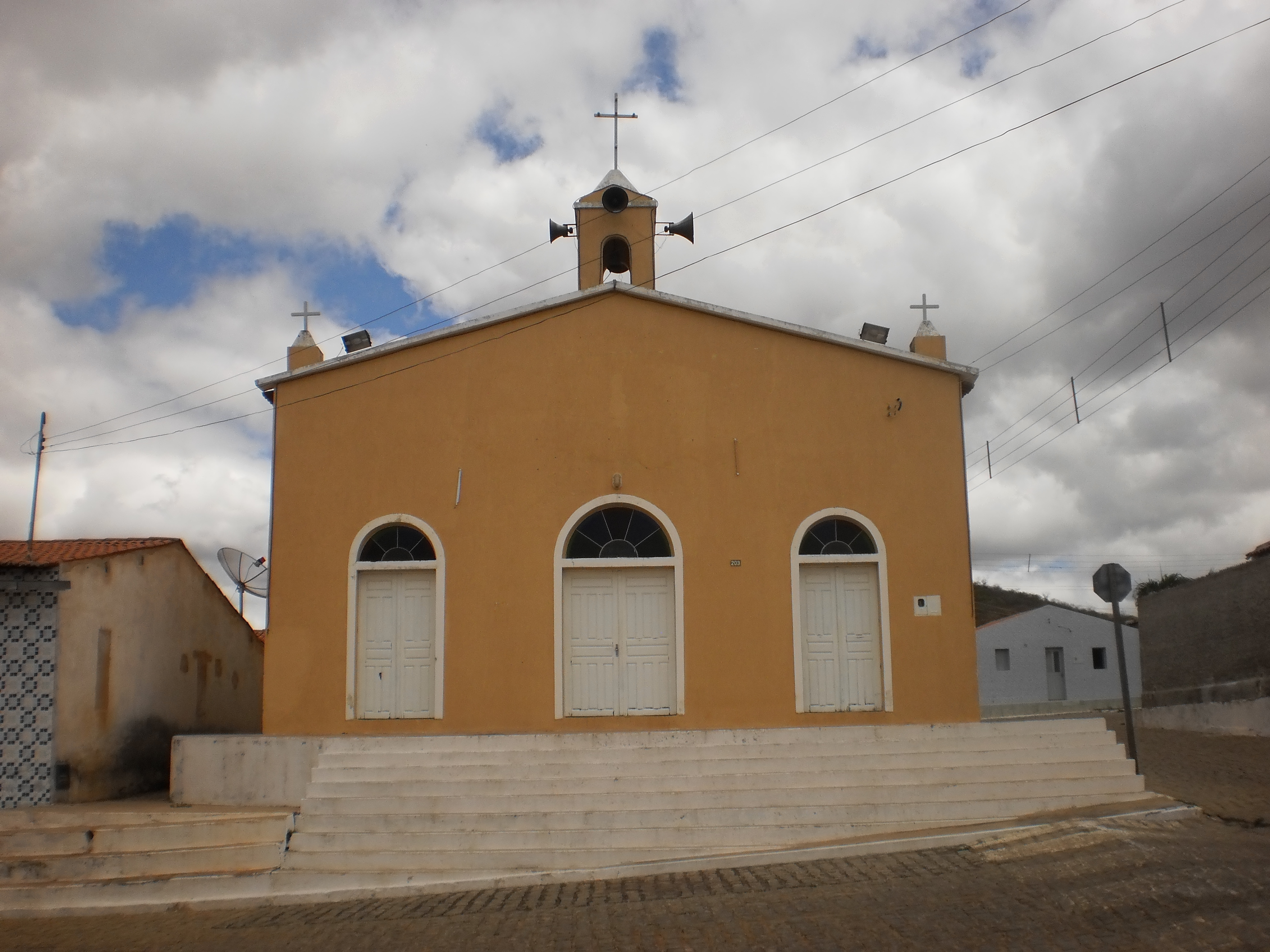 Capela de Nossa Senhora do Perpétuo Socorro, da Paróquia de São Miguel - Venha-Ver, Rio Grande do Norte, Brasil.